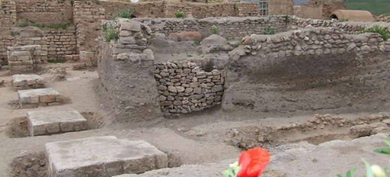 آتشکده شیان در اسلام آباد غرب